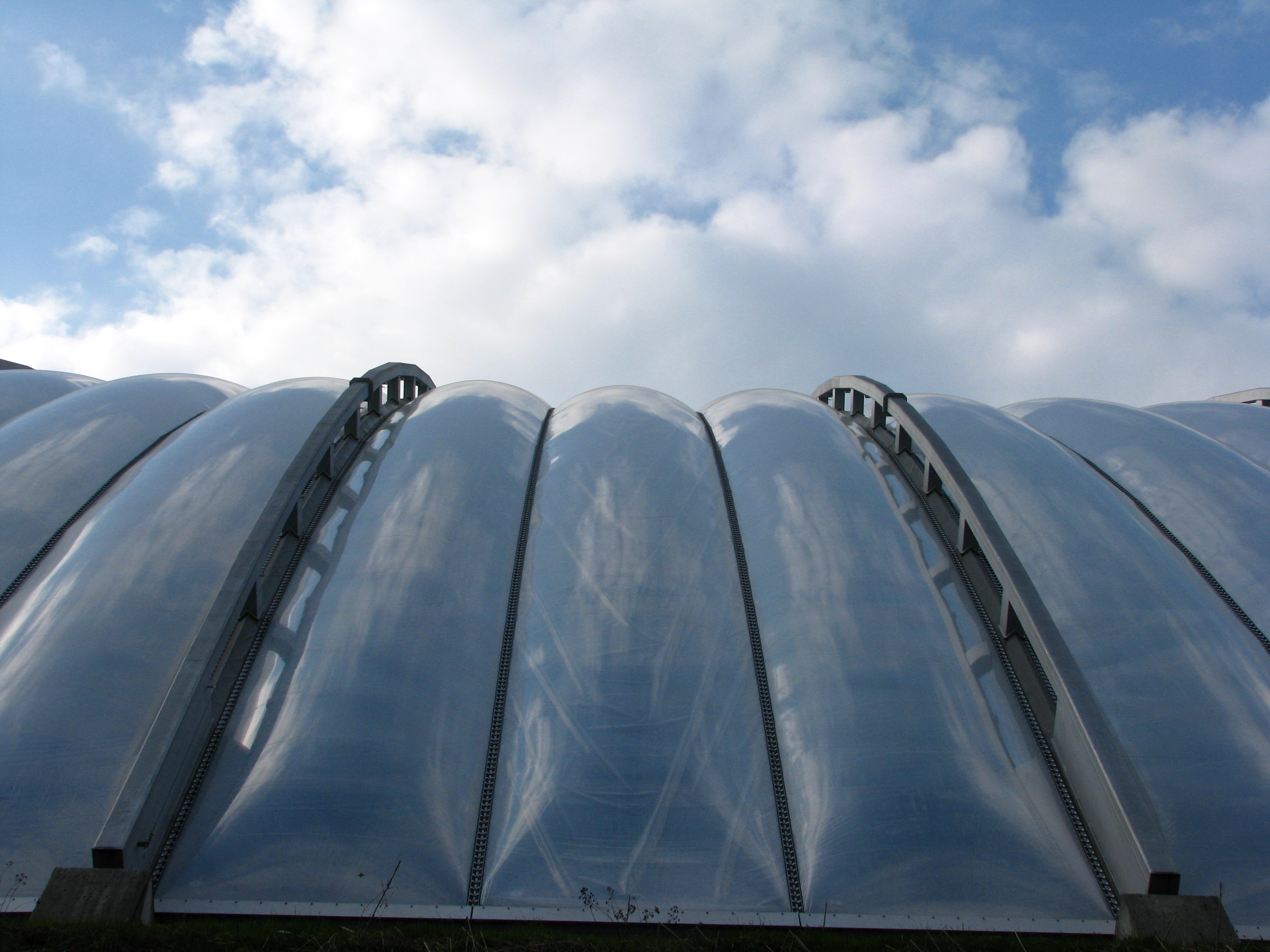 Zürich Zoo Masoala Hall (Switzerland)